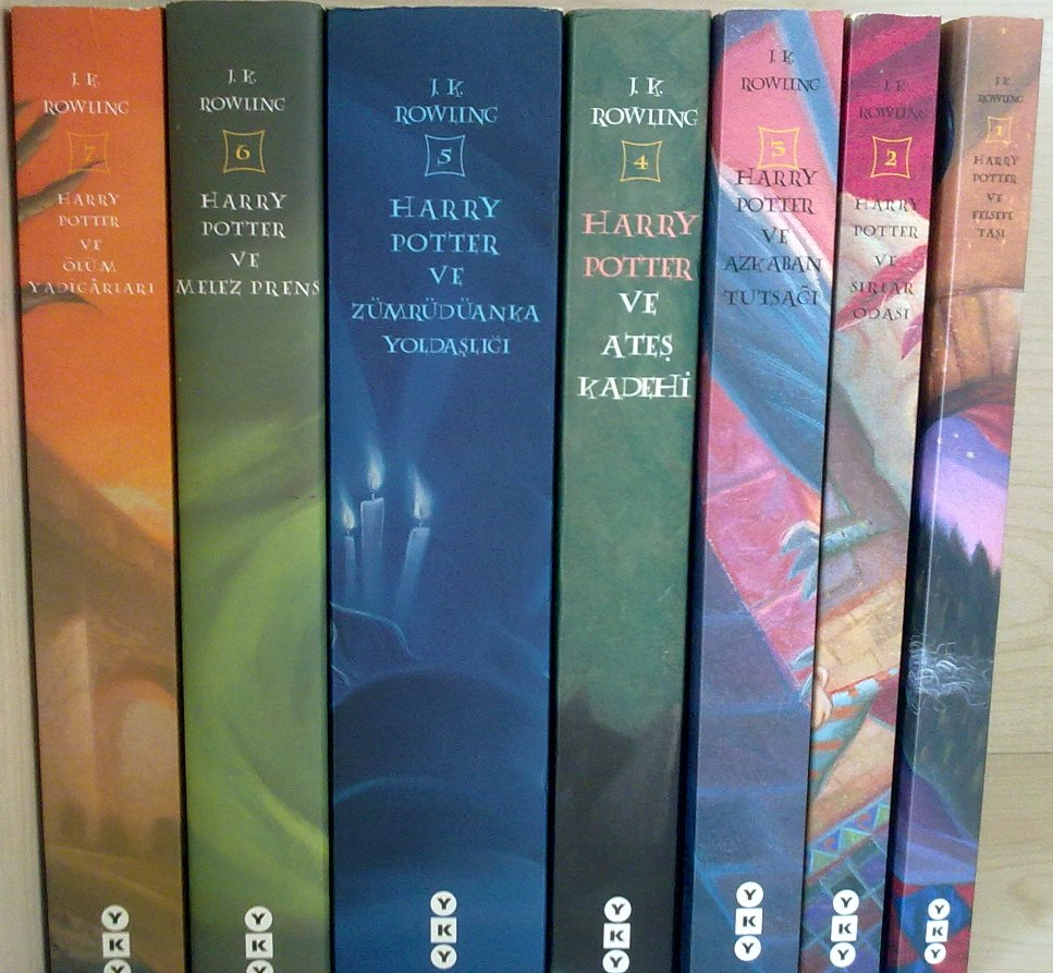 Harry Potter kitapları Türkiye baskıları